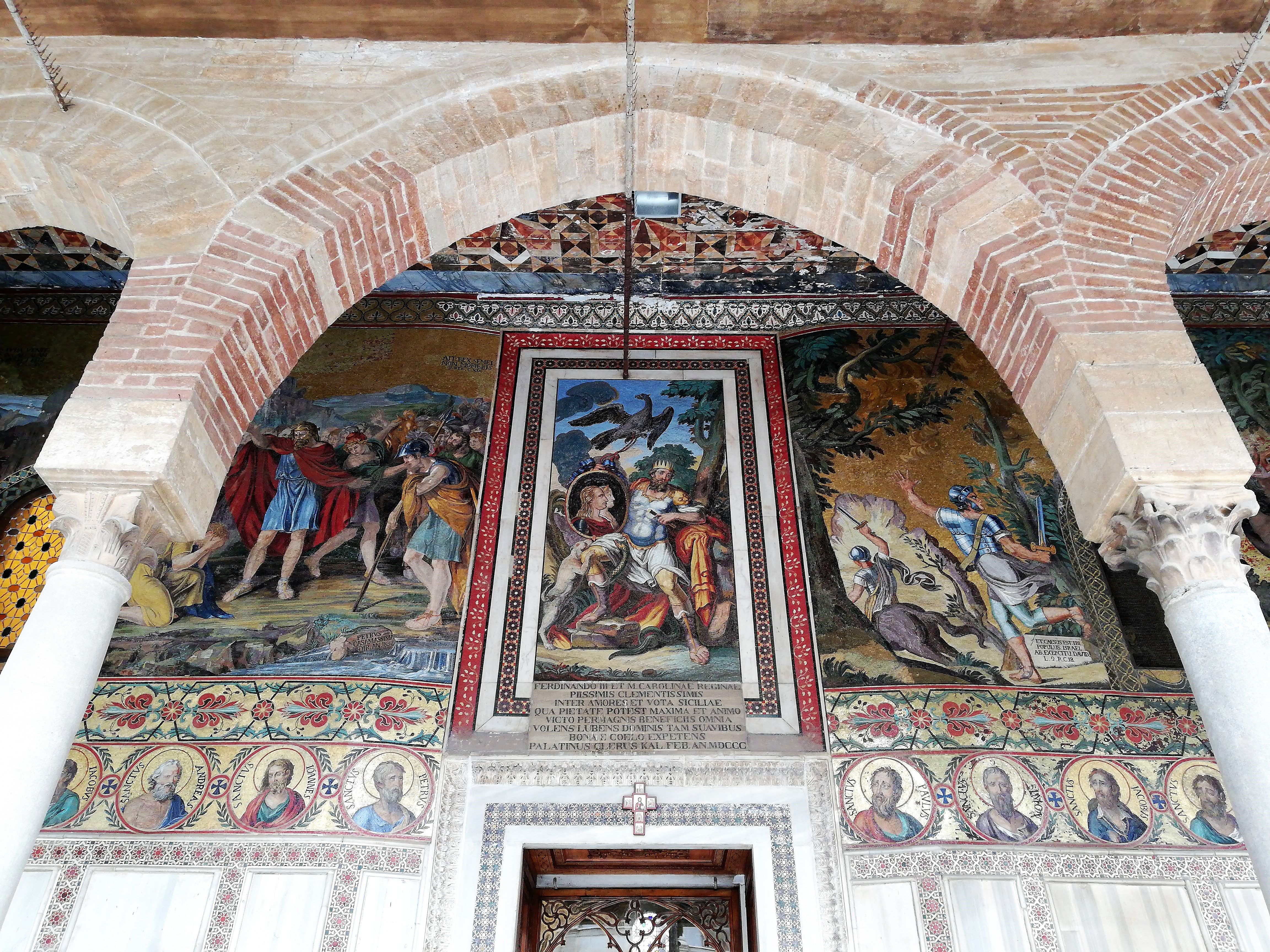 Accesso alla Cappella Palatina.